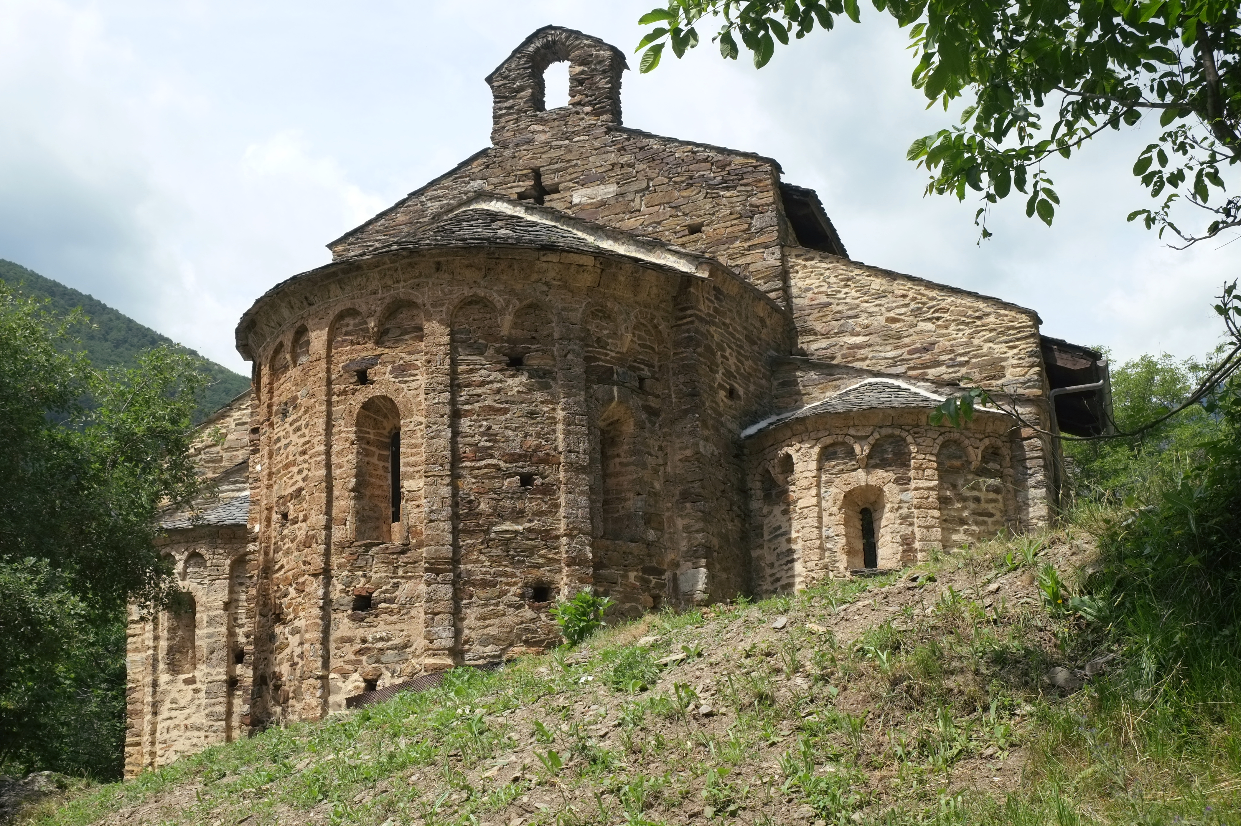 Kloster Sant Pere de Burgal in Escaló in der Provinz Lerida in Katalonien (Spanien)